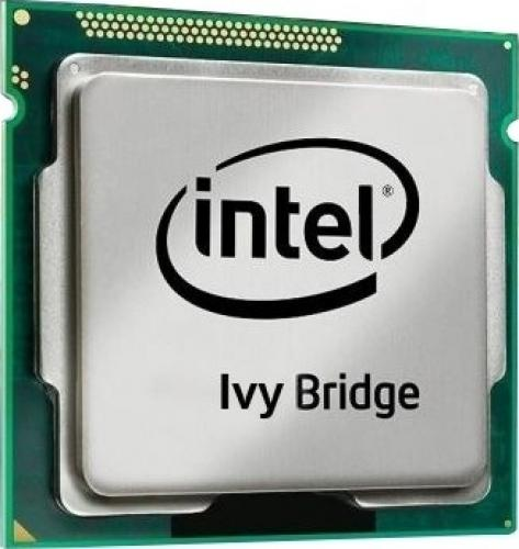 Poza